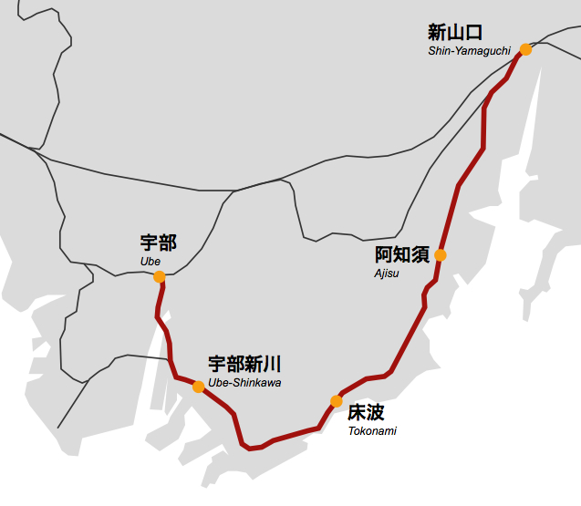 JR宇部線路線図